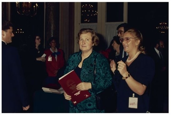 Tina Anselmi alla presentazione dell' Enciclopedia "Il Parlamento Italiano" di Mondadori